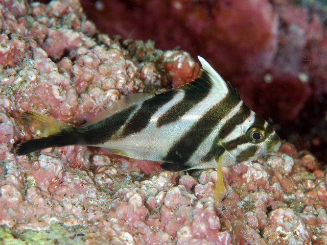 ミギマキ Goniistius zebra